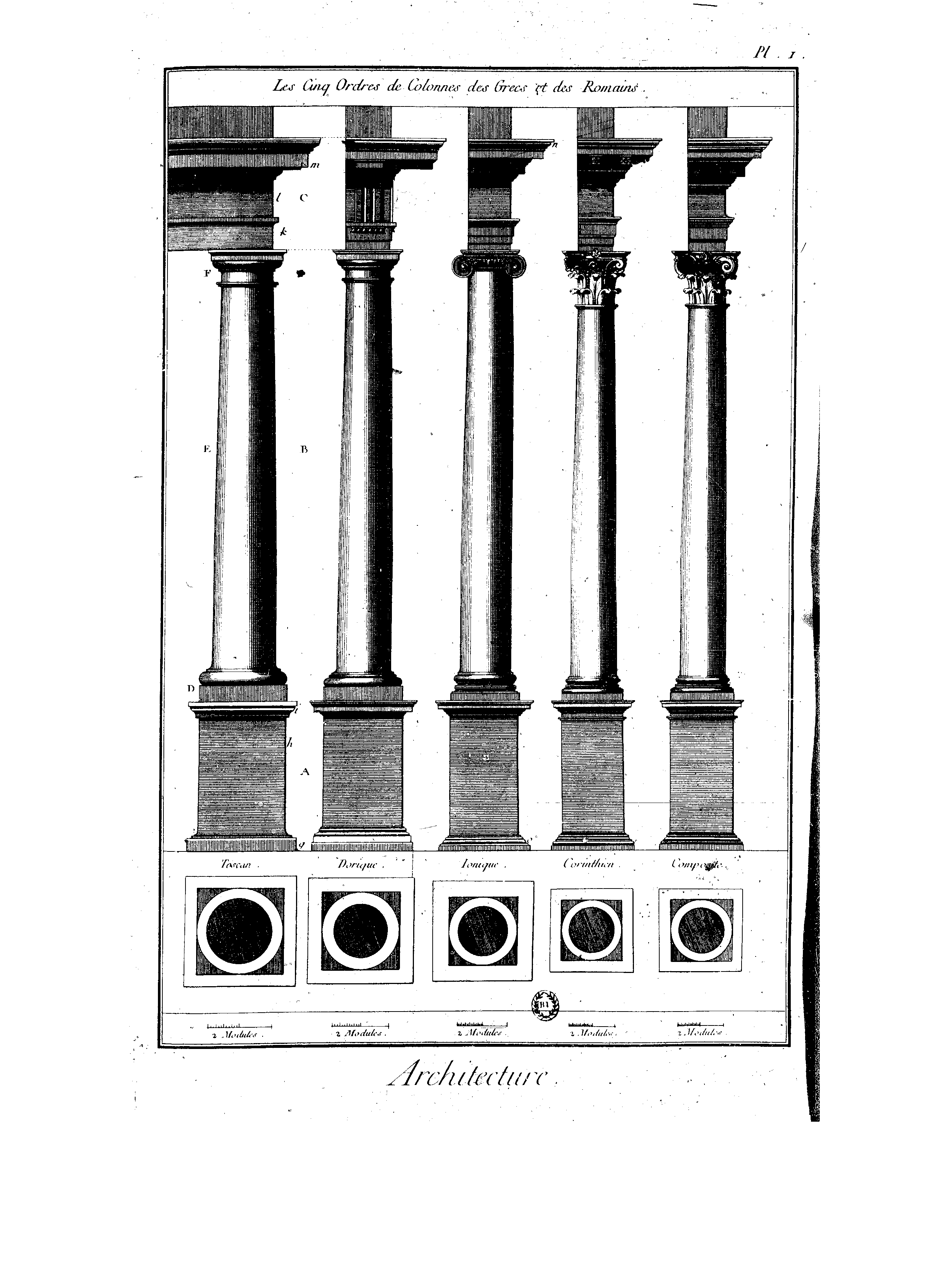 Planches de l'Encyclopédie de Diderot et d'Alembert, volume 1.